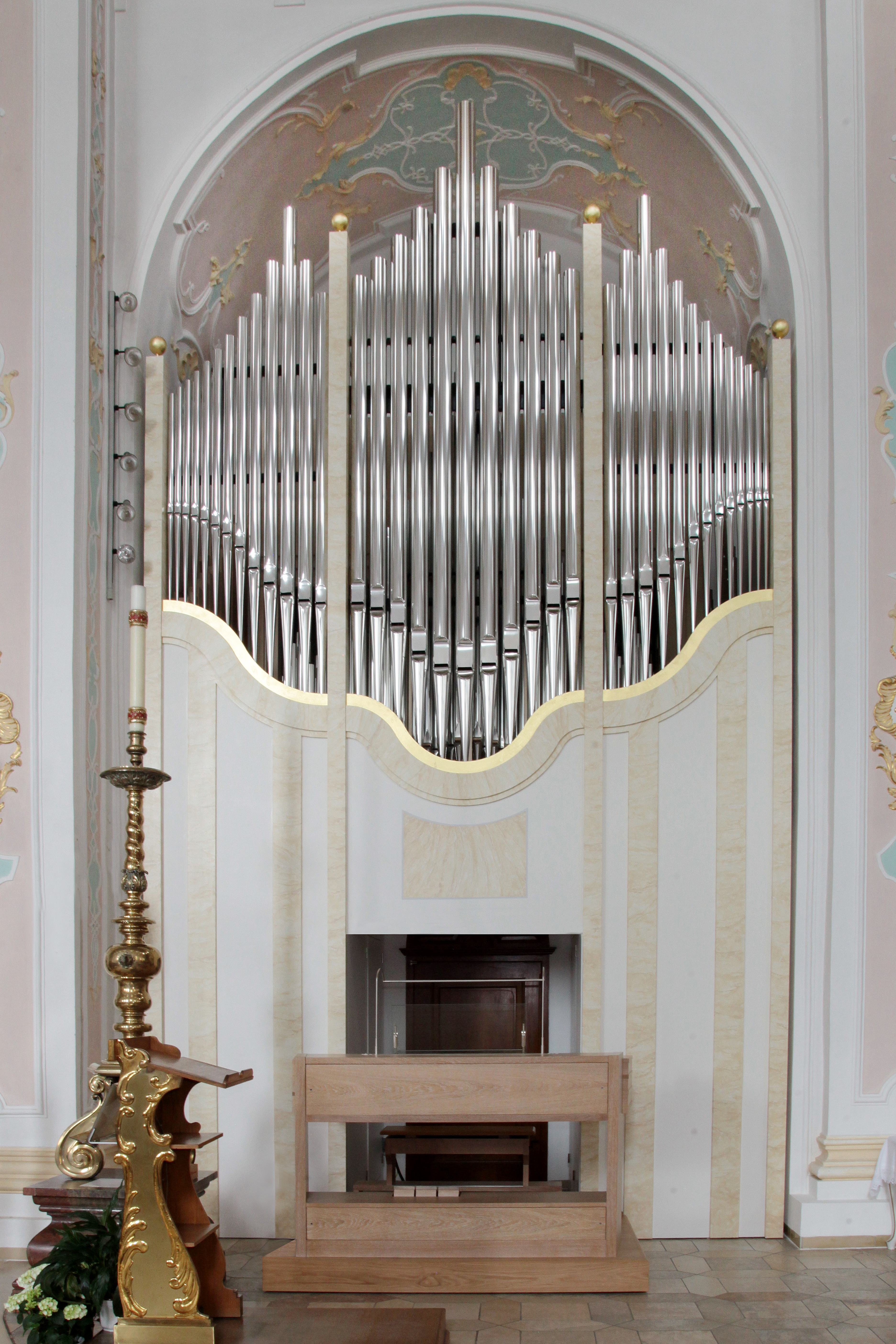 Neubau Chororgel in Deggendorf durch Orgelbau Vleugels